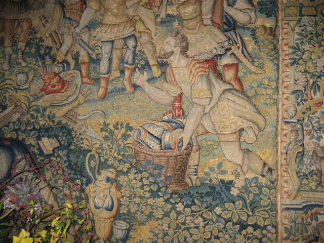 Door Michiel Coxie (1499 - 1592). Eigen foto door Ineke Hoogland